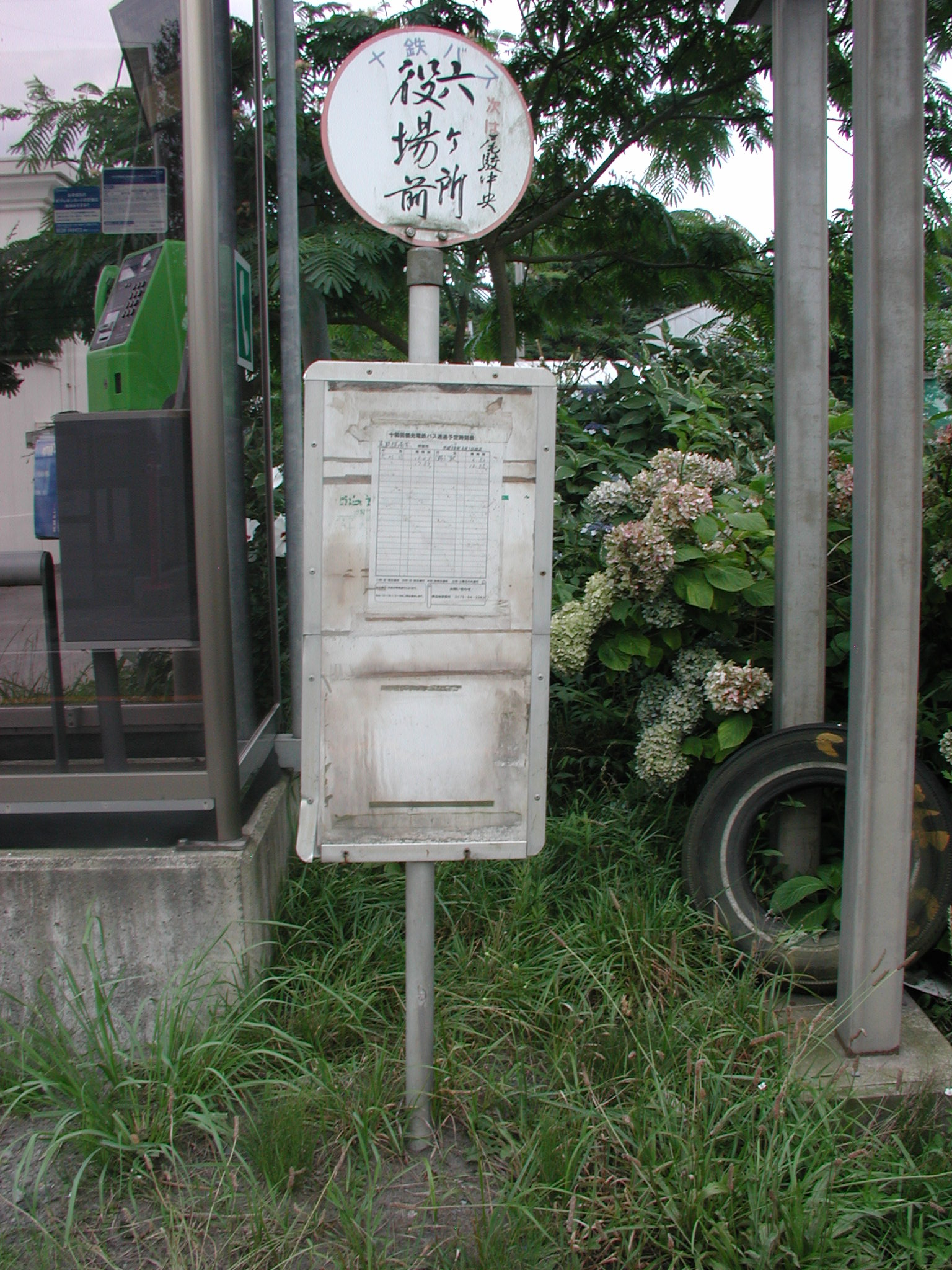 十和田観光電鉄 筆書き式バス停ポール（野辺地 - 平沼 - 六ヶ所線：「六ヶ所役場前」バス停留所 ）